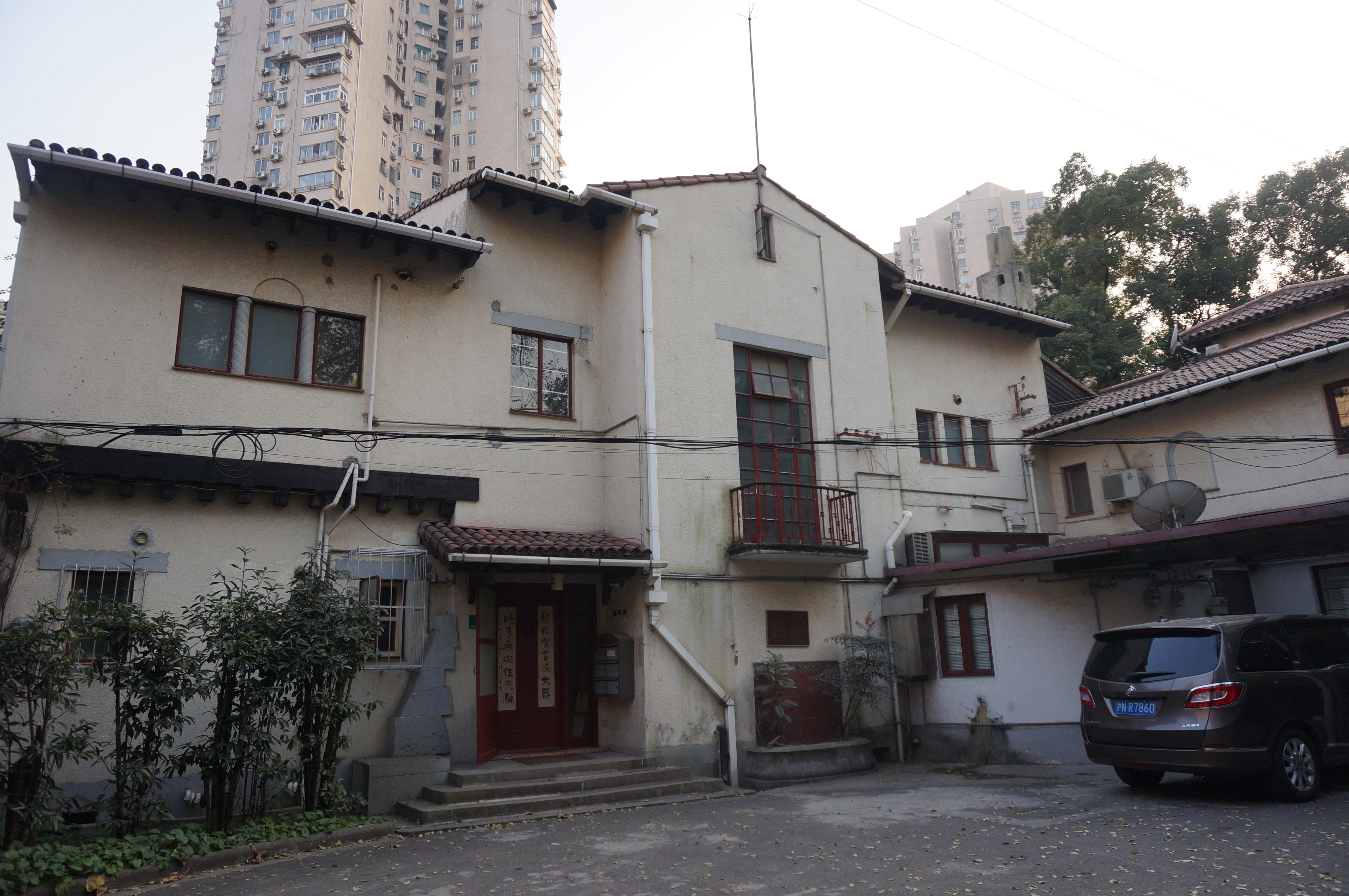 泰安路115弄6号住宅